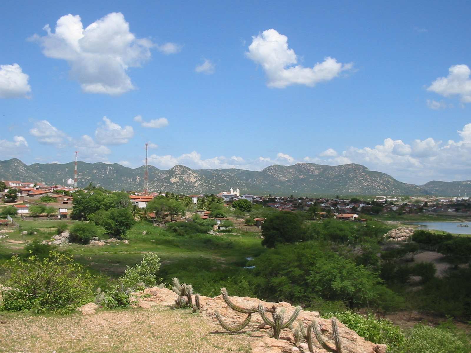 Imagem de Acari, Rio Grande do Norte, Brasil.